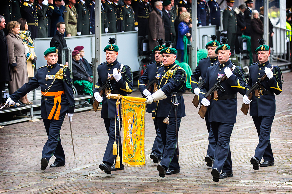 Uitreiking Militaire Willems-Orde aan het Korps Commandotroepen in 2016.